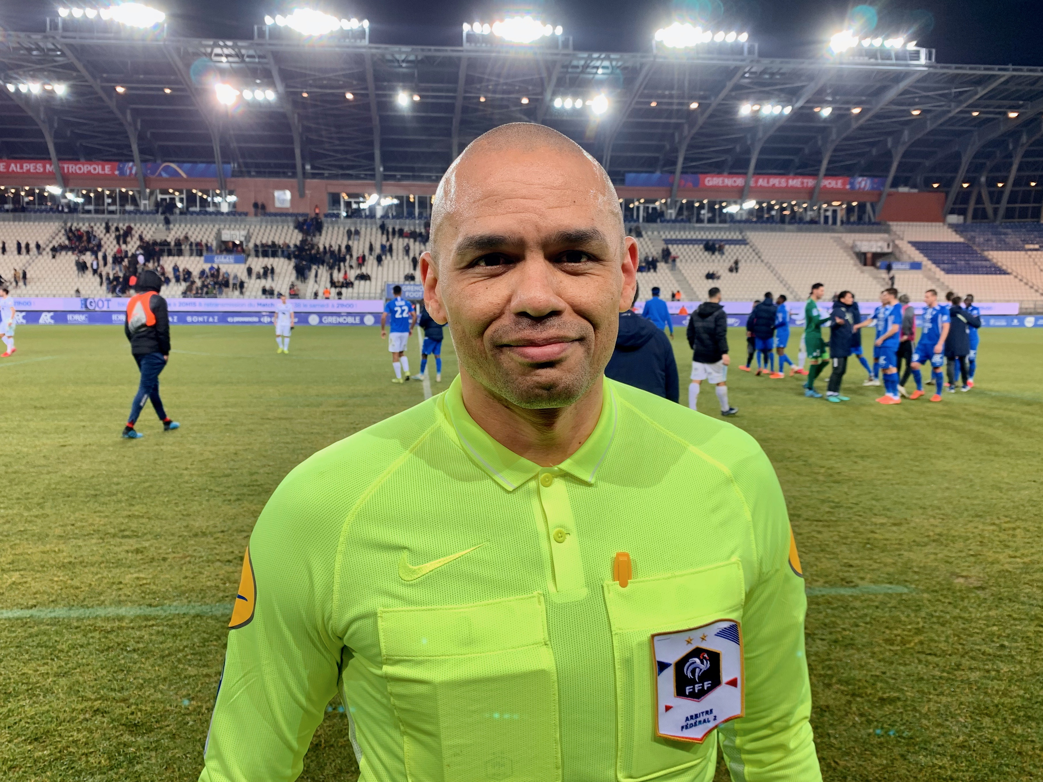 Gaël Angoula est arbitre.